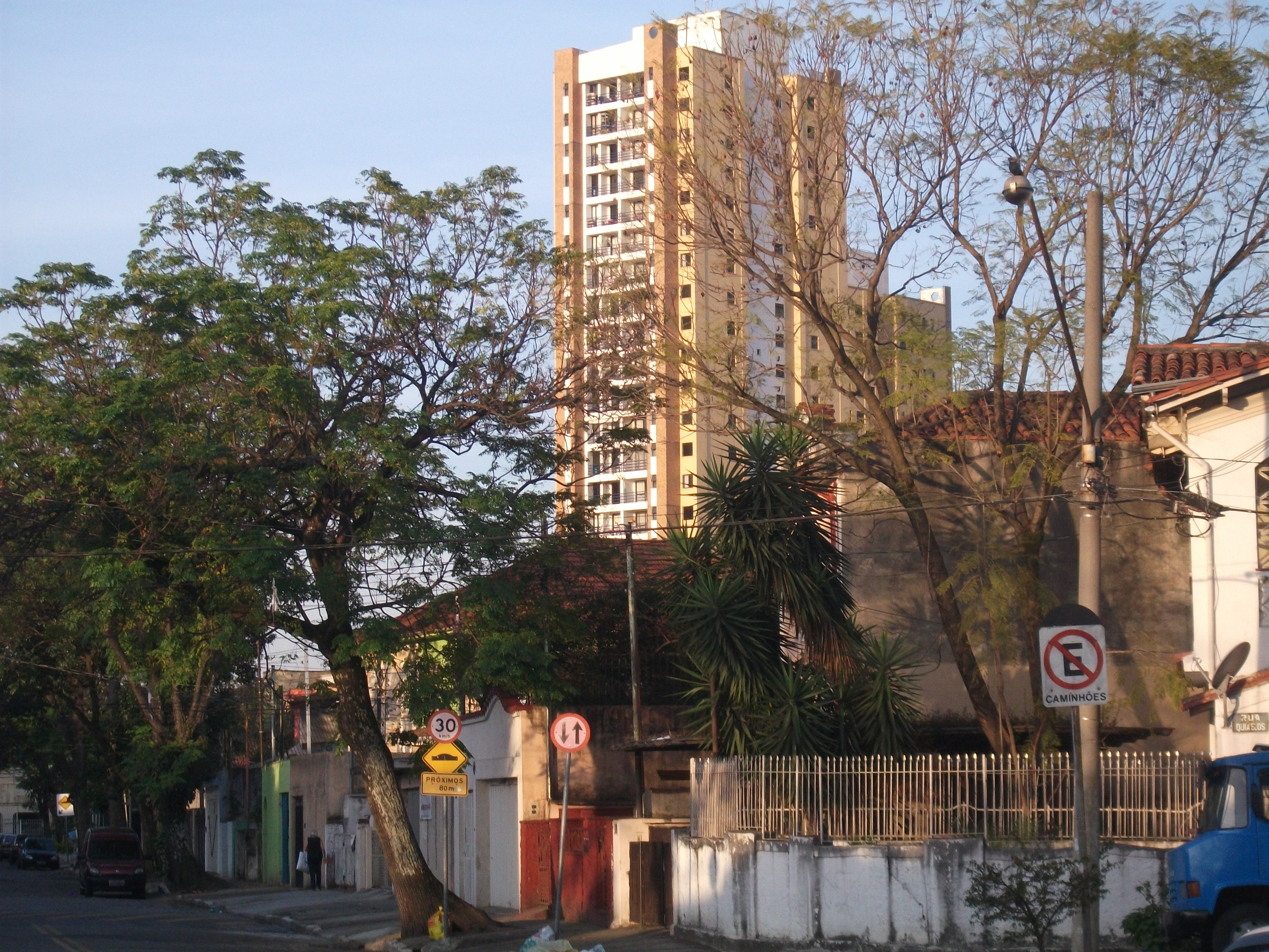 Vista da Rua Pascoal Malatesta na região do Canindé no Pari.